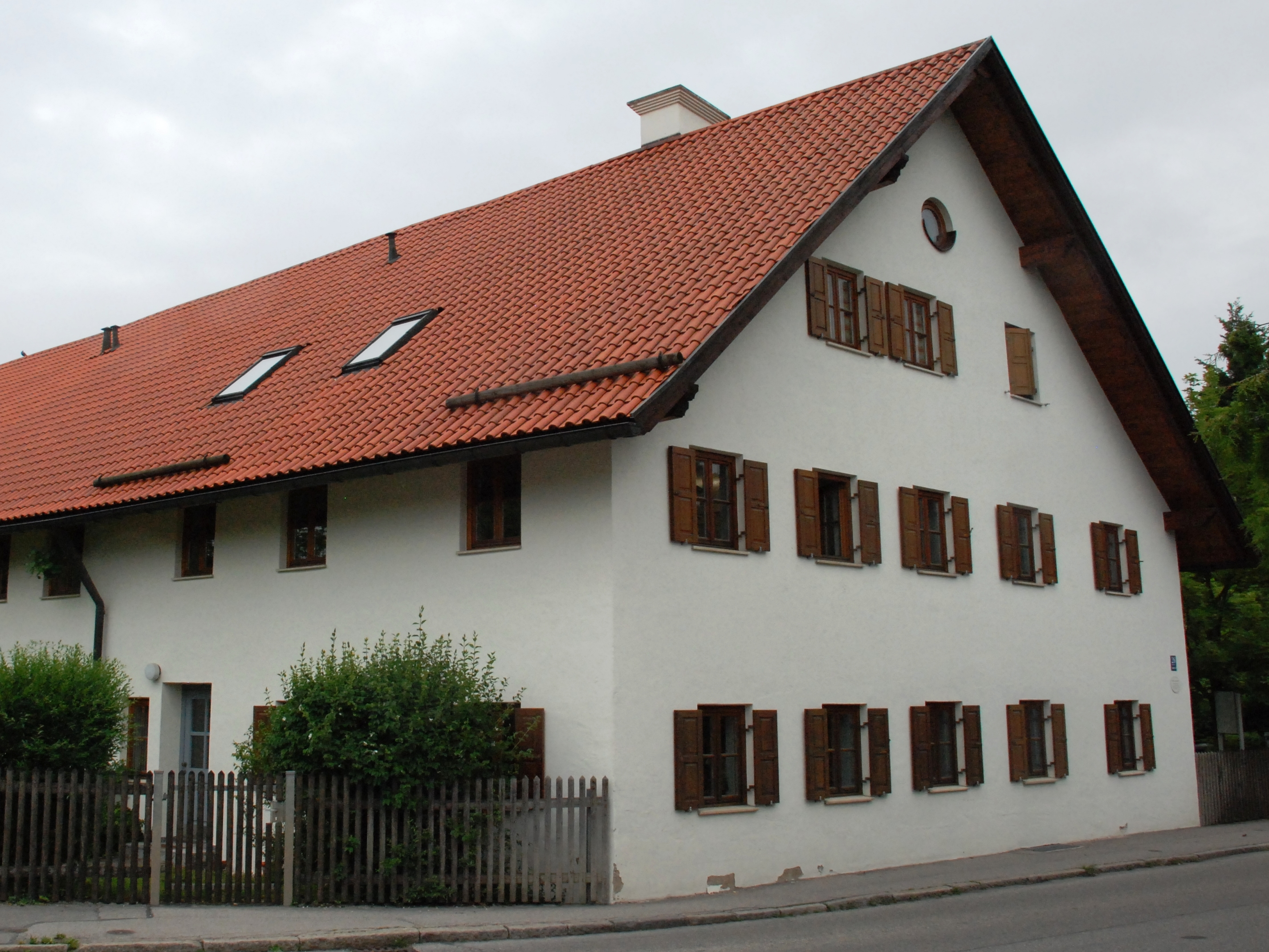 Bauernhaus und ehemaliges Wirtshaus, Hausname „Beim Wirtsbauer“, in der Gautinger Straße26 in der Gemeinde Neuried, Landkreis München, Bezirk Oberbayern, Bayern. Bauwerk im Kern aus den Jahren 1643 und 1696, Äußeres erste Hälfte 19. Jahrhundert. Als Baudenkmal unter Aktennummer D-1-84-132-5 in der Bayerischen Denkmalliste aufgeführt. Foto gemäß den Voraussetzungen zur Panoramafreiheit von öffentlichem Verkehrsgrund aus aufgenommen.